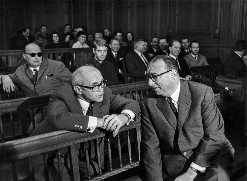 2001_03_0275.4240 Ludwig Binder: Studentenrevolte 1967/68, West-Berlin; veröffentlicht vom Haus der Geschichte der Bundesrepublik Deutschland Prof. H. Gollwitzer und Regierender Bürgermeister a.D. H. Albertz. [1]